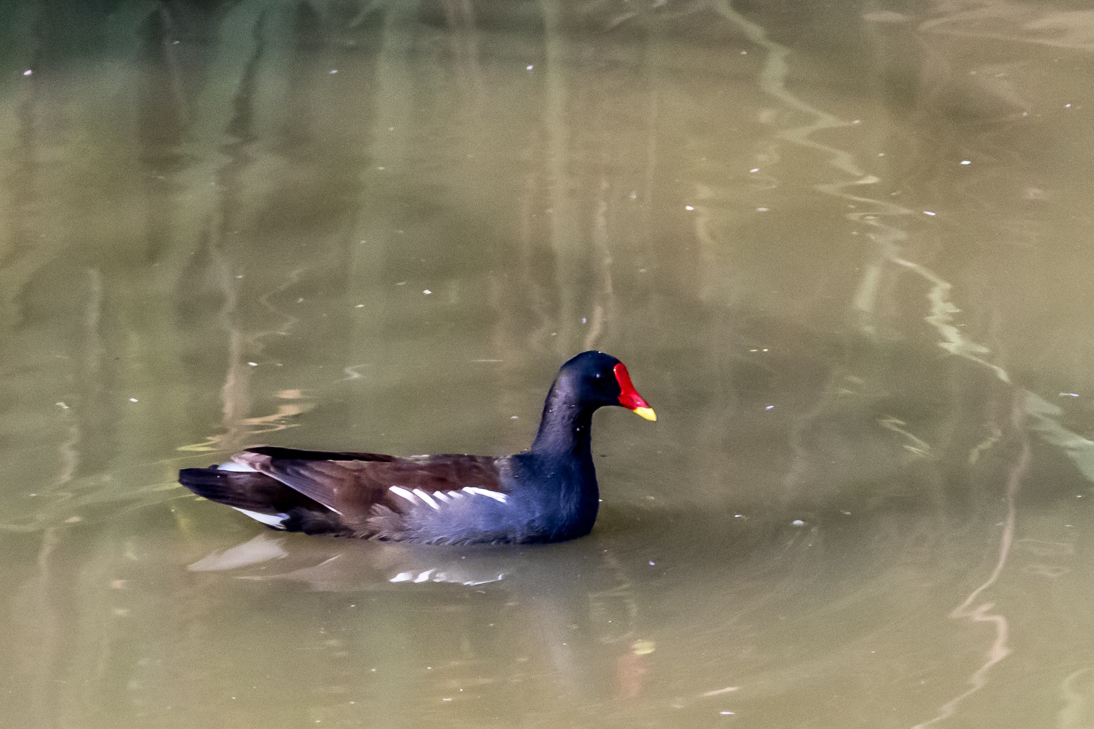 אֲגַמּוֹן חוּלָה הוא אגם מלאכותי במרכז עמק החולה, וסביבו אתר תיירות המהווה מוקד צפרות בשל העופות הרבים הנקבצים בו, בעיקר עופות ימיים. באתר ניתן לסייר באמצעות אופניים, רכב חשמלי, או עגלת מסתור.